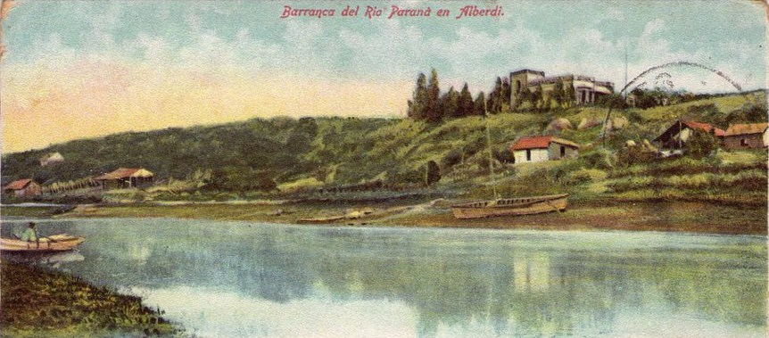 Postal de la barranca de Alberdi en Rosario, Santa Fe. Enviada en 1910.